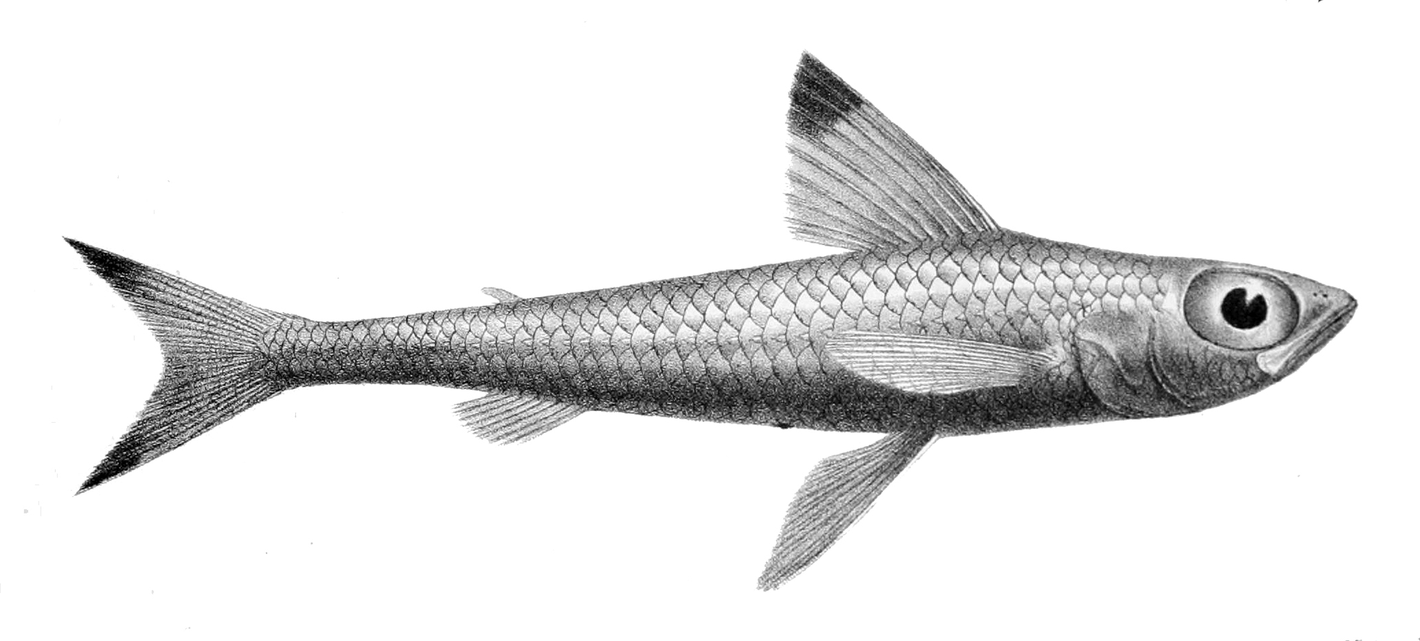 Paraulopus nigripinnis